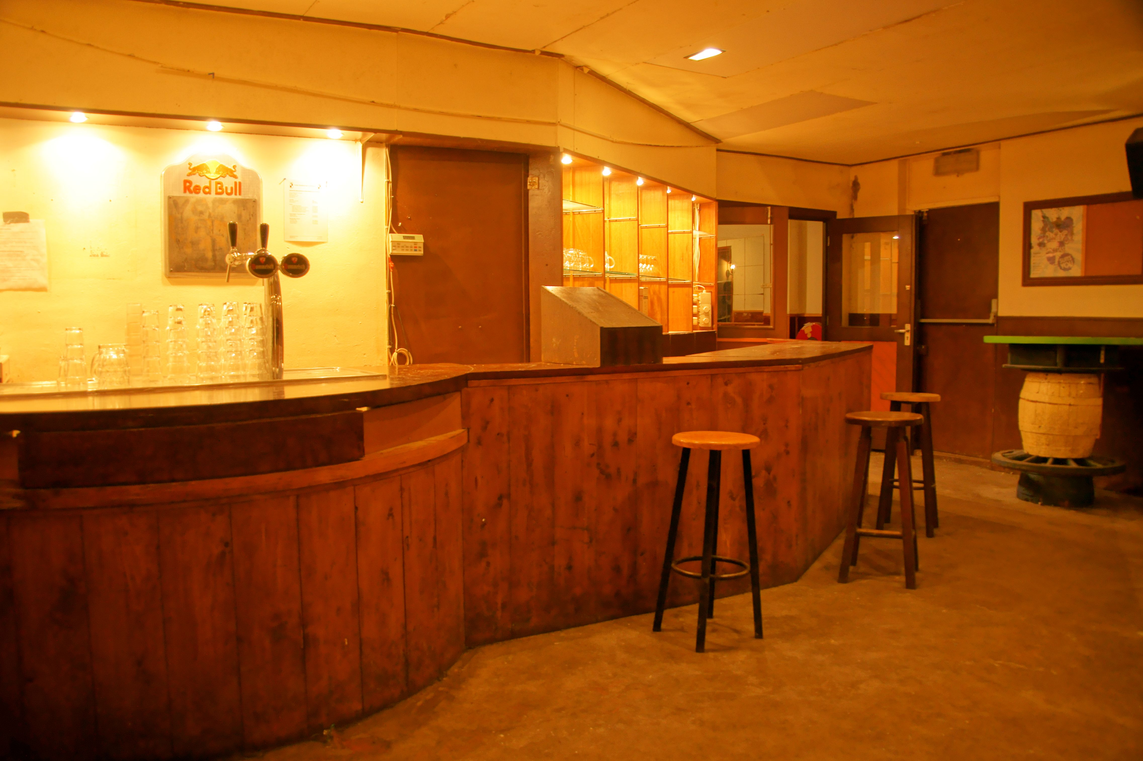 Achterzaal Unitas S.G.